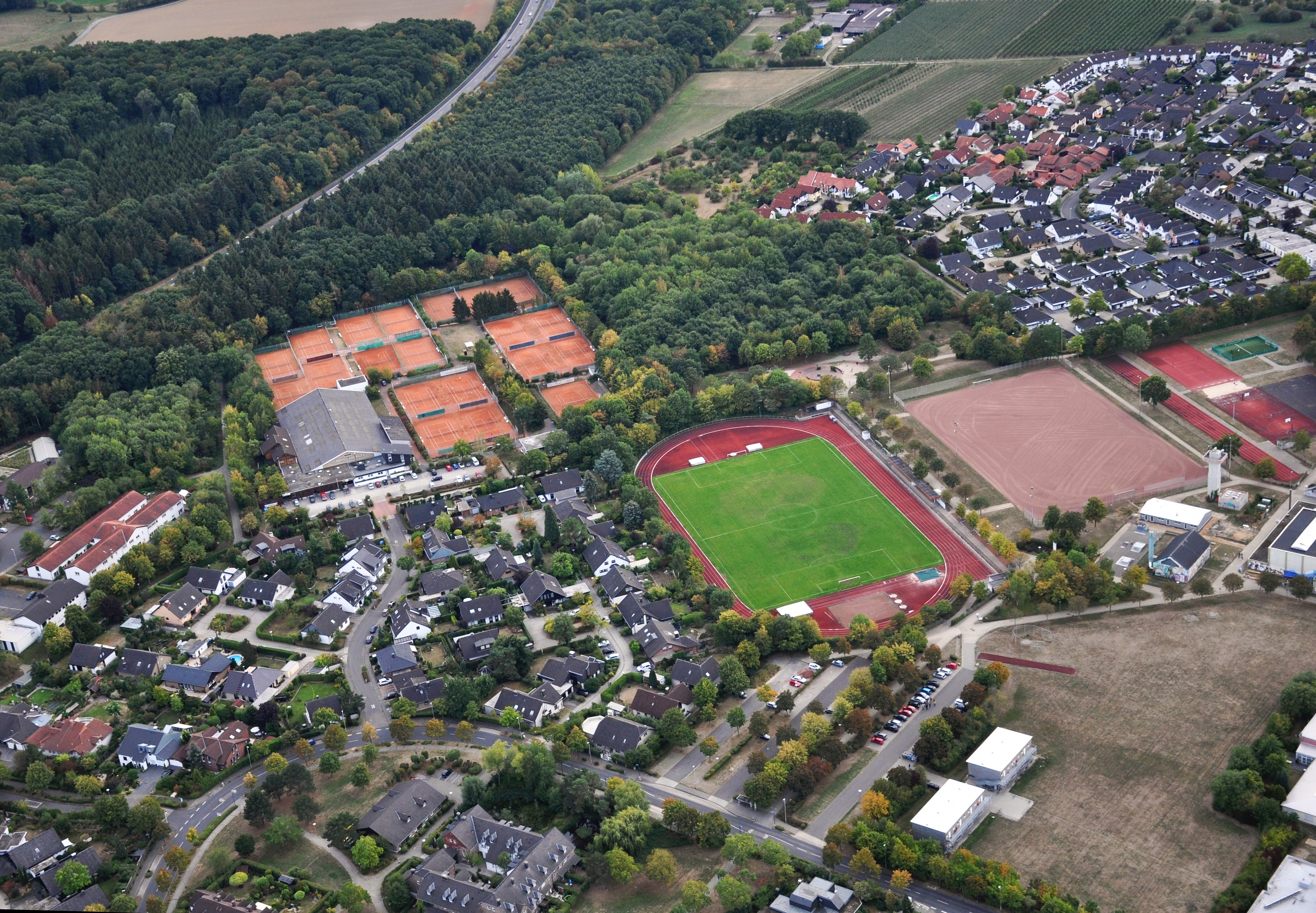 Meckenheim – Neue Mitte, Sportstätten September 2018